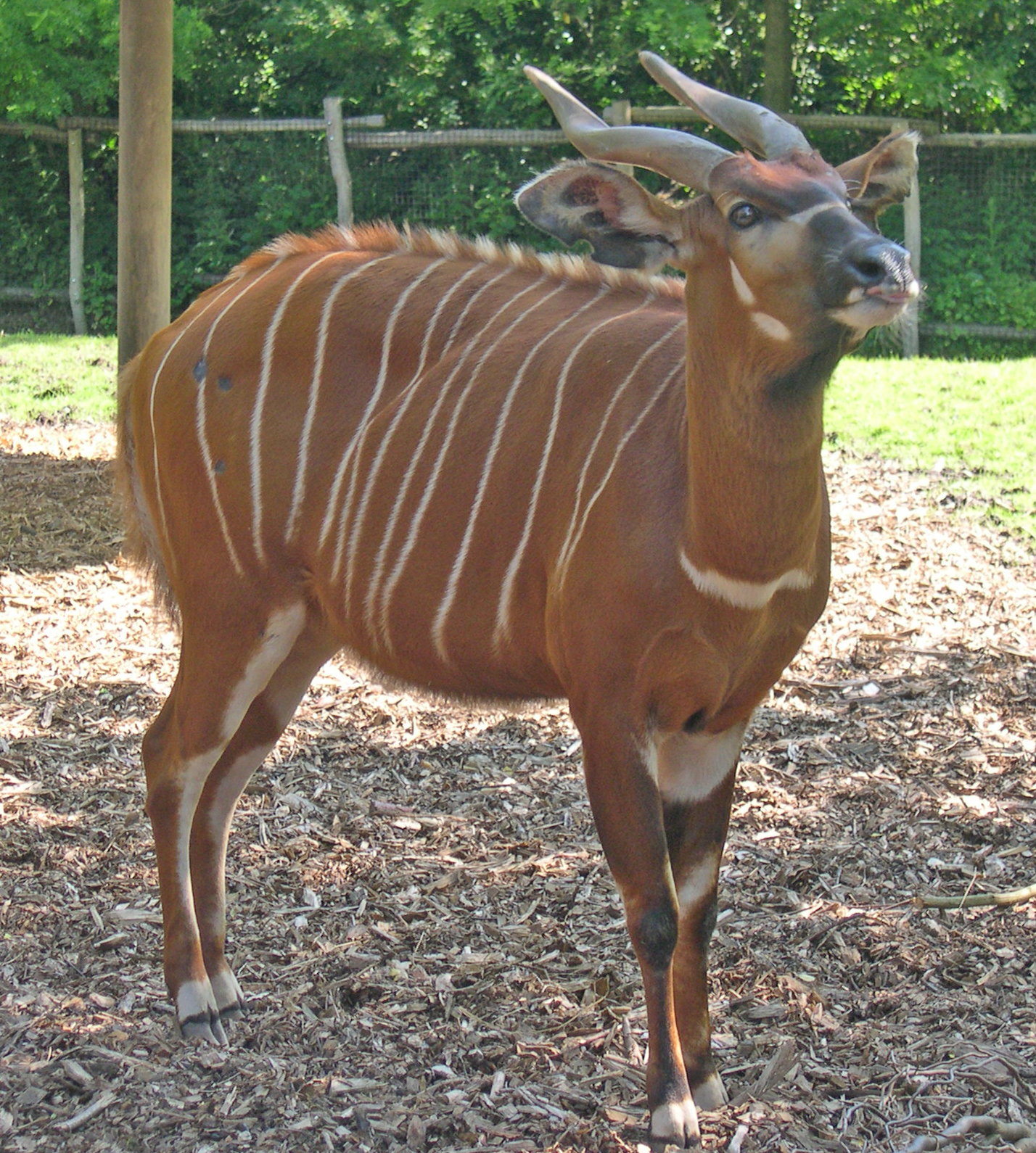 Tragelaphus eurycerus in Diergaarde Blijdorp, Rotterdam Picture taken by Magalhães on June 18th 2006